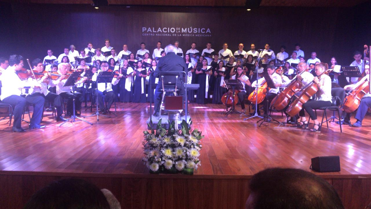 Homenaje luctuoso al Maestro Jorge Medina Leal. Fernando Lozano dirigiendo a la Orquesta de Cámara de la Ciudad de Mérida, Yucatán. Réquiem de Fauré. Realizado en Yucatán, México, en el Palacio de la Música.